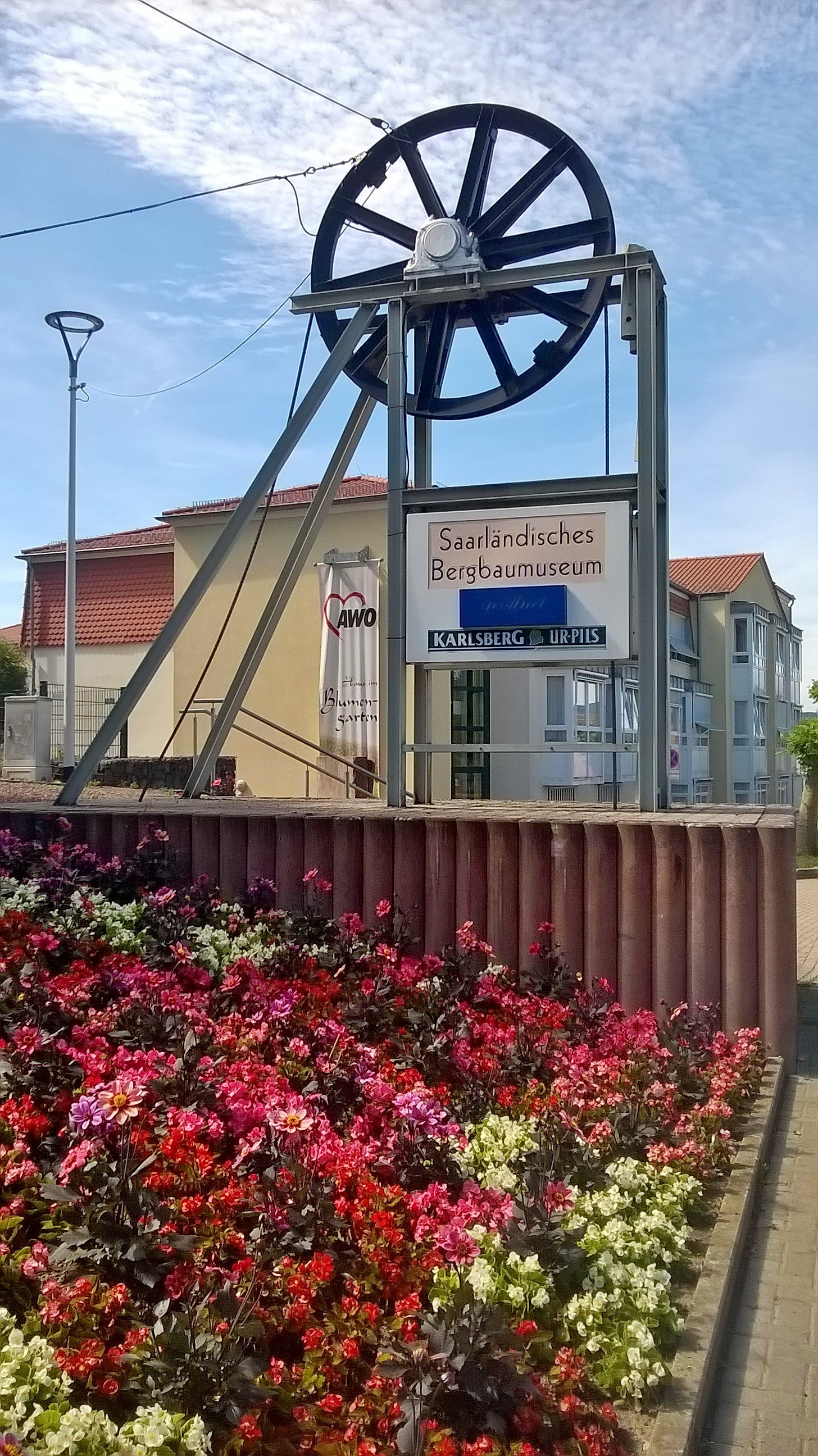 Schild des Saarländischen Bergbaumuseums